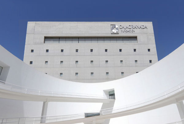 Sede de CAJAGRANADA Fundación diseñada por Alberto Campo Baeza